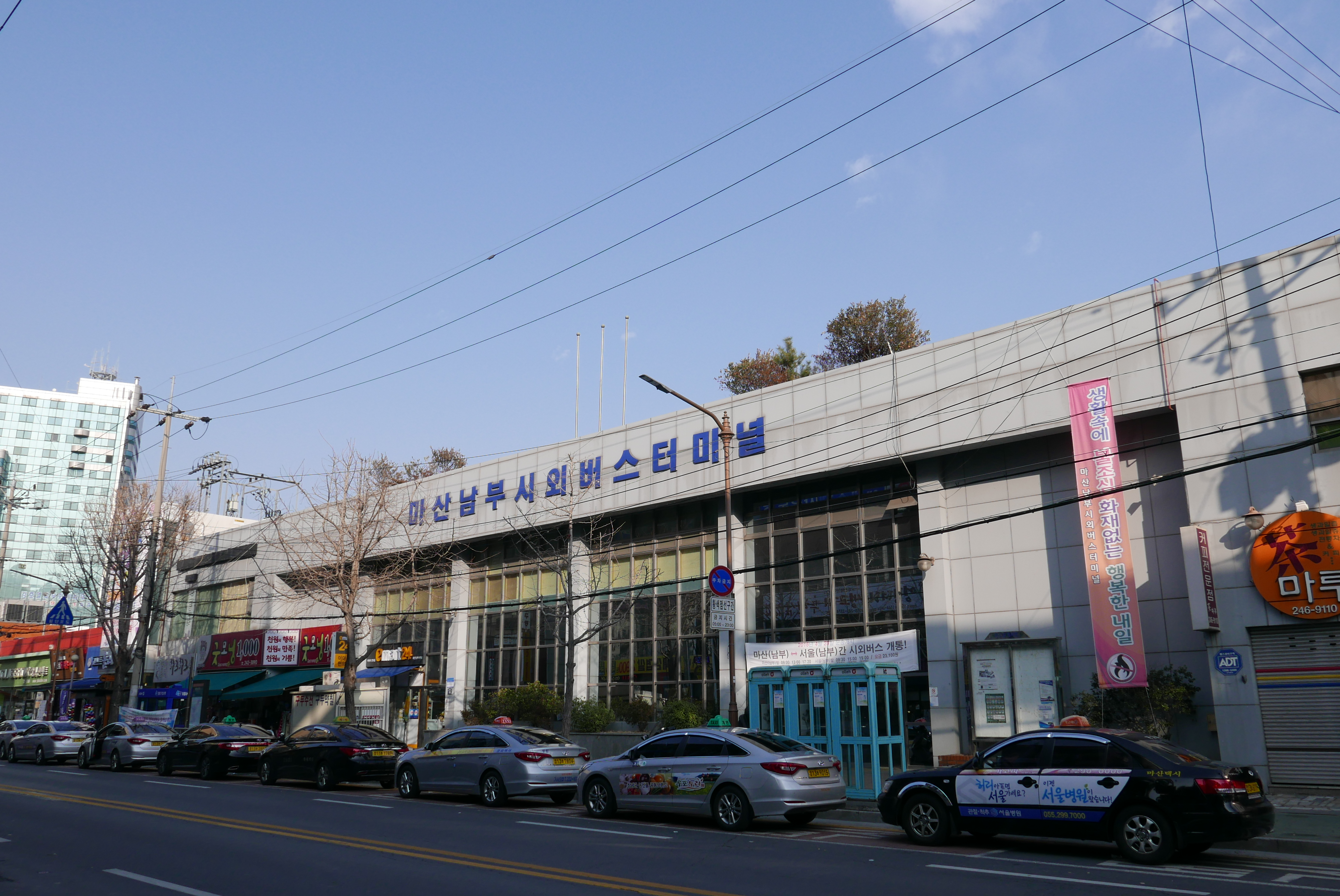 마산남부시외버스터미널